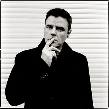 IC Falkenberg (Ralf SchmidtBildproduktion für das Musikmagazin "Melodie und Rhythmus"